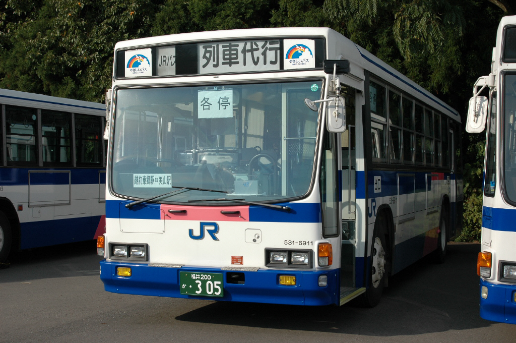 越美北線災害時の代行バス 金沢営業所美山派出所 2005-11-5